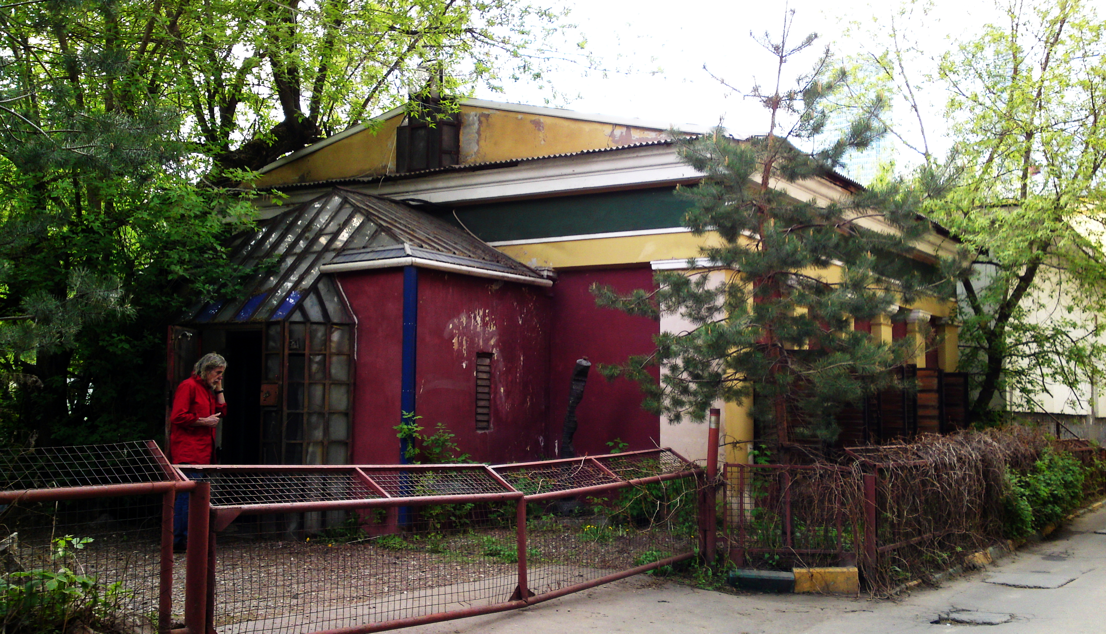 Мастерская художника Теодора Тэжика в здании бывшей трансформаторной подстанции. Москва, Студенческая ул., 22а